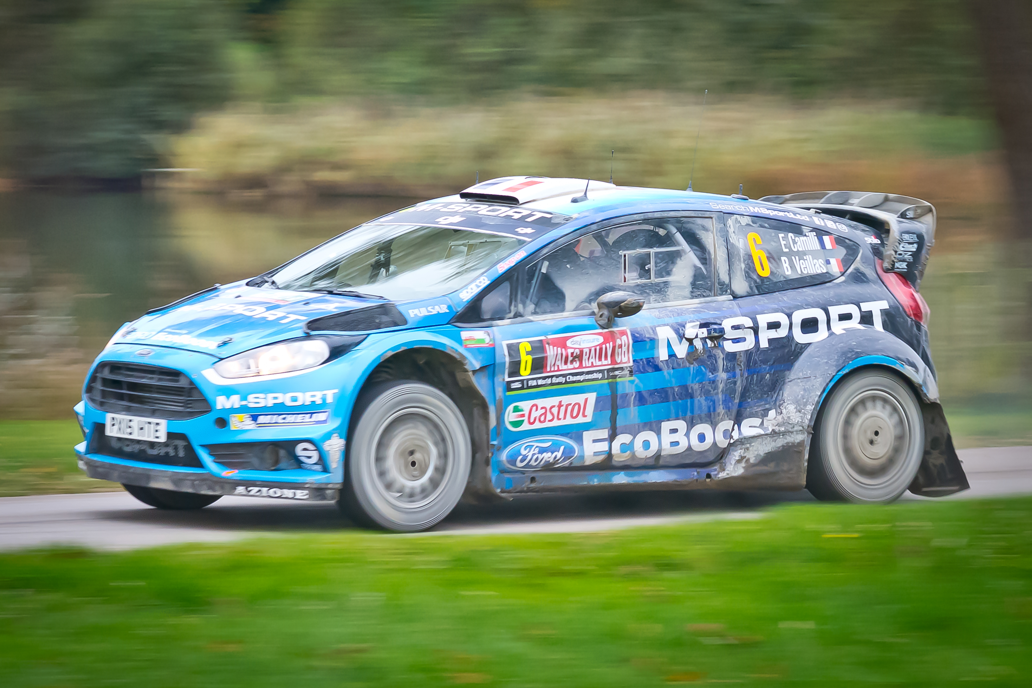 Eric Camilli podczas Rajdu Wielkiej Brytanii 2016